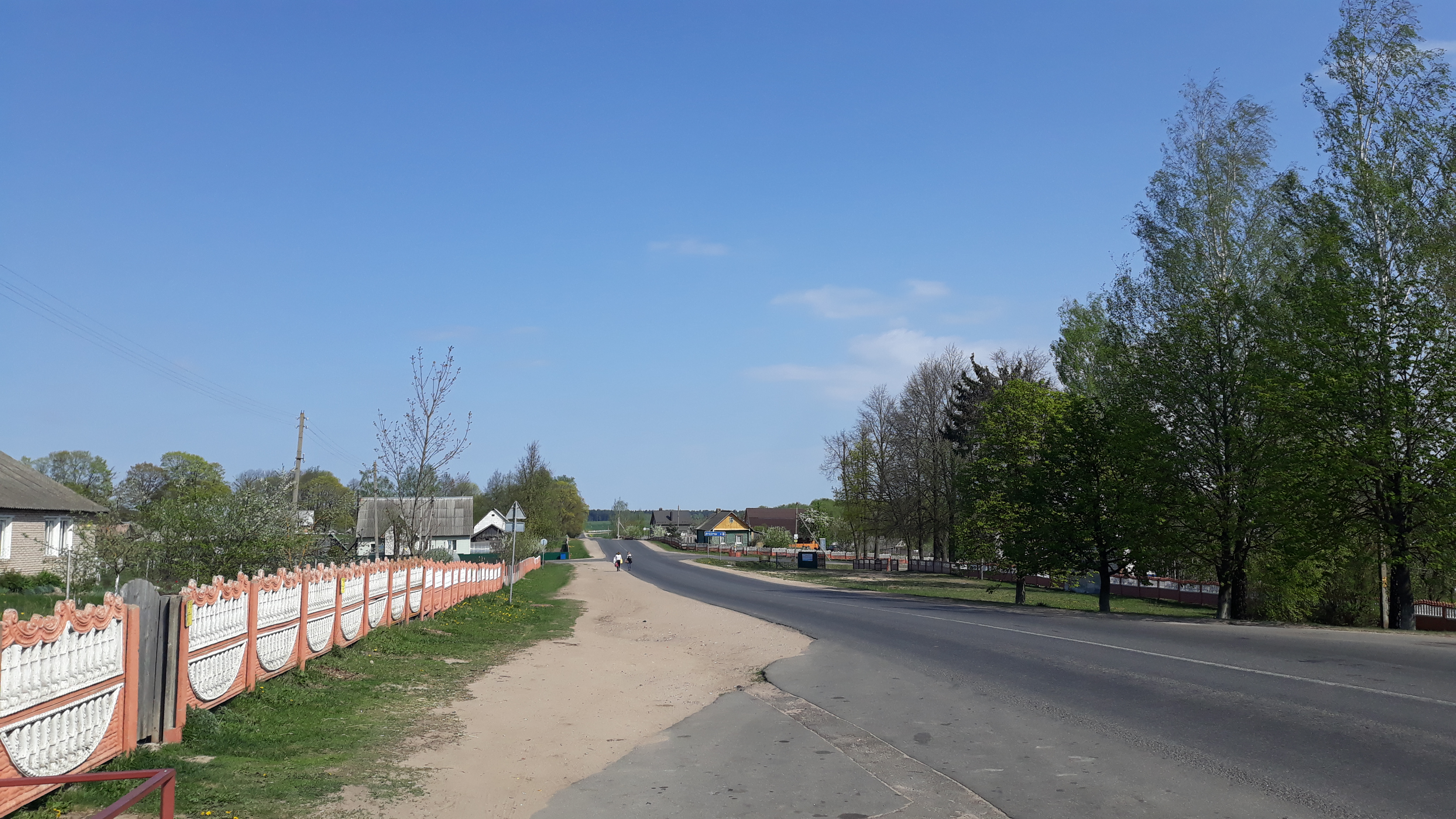 Цэнтральная вуліца